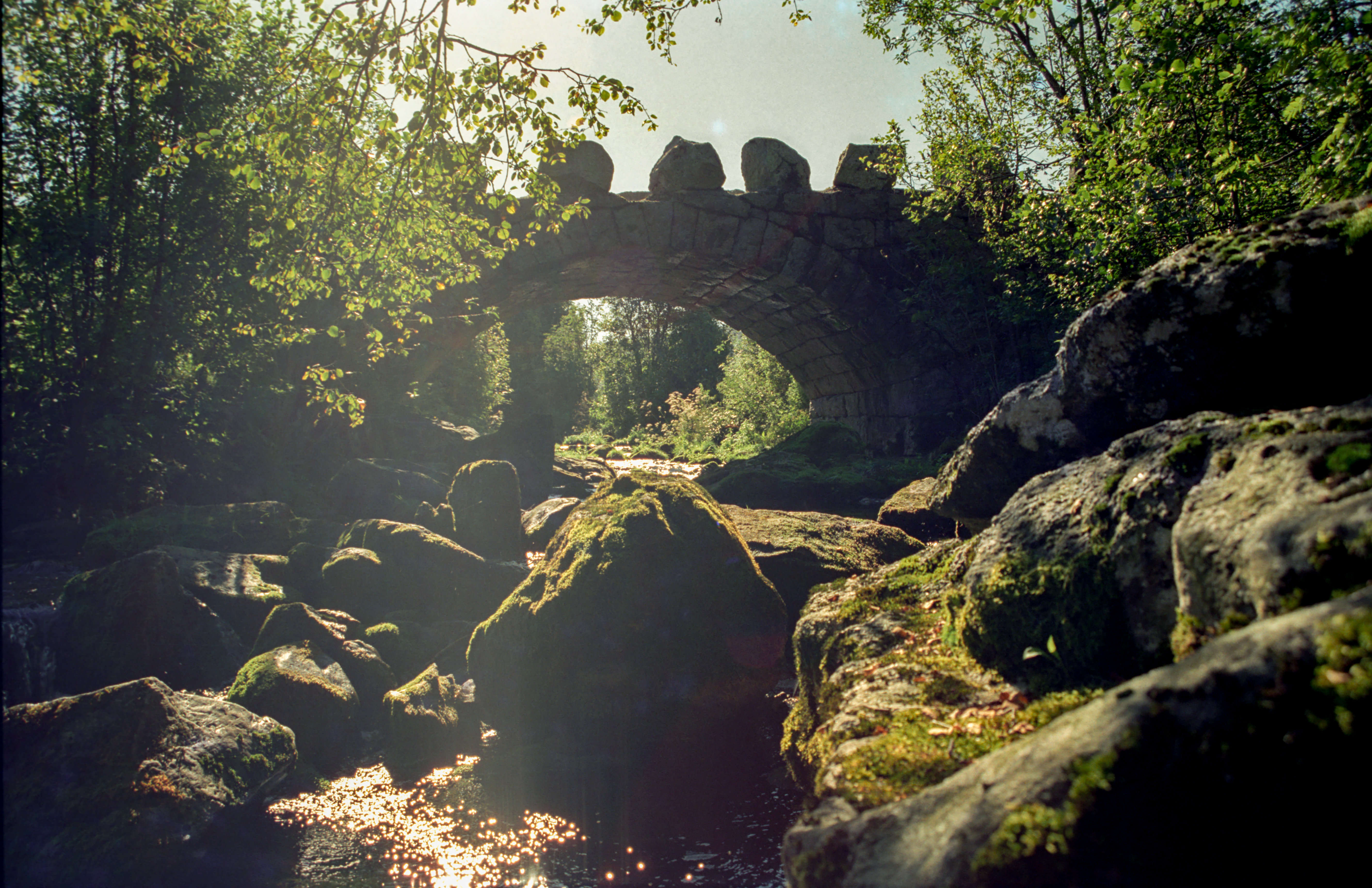 Stary most kamienny, Hjelmelandsvågen